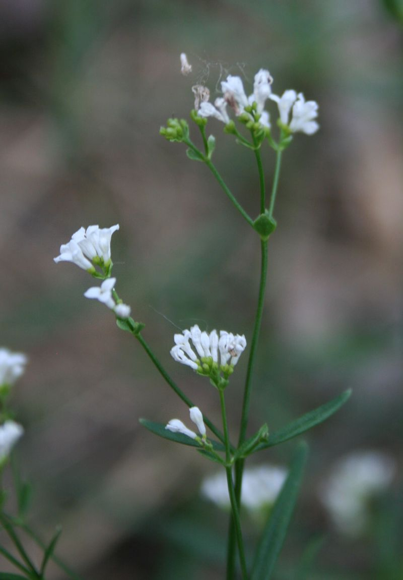 Färber-Meier (Asperula tinctoria), Kaffeegewächse (Rubiaceae) - Ungarn/Magyarország/Hungary: Pest megye, Szénás-Hügel bei Pilisszentiván